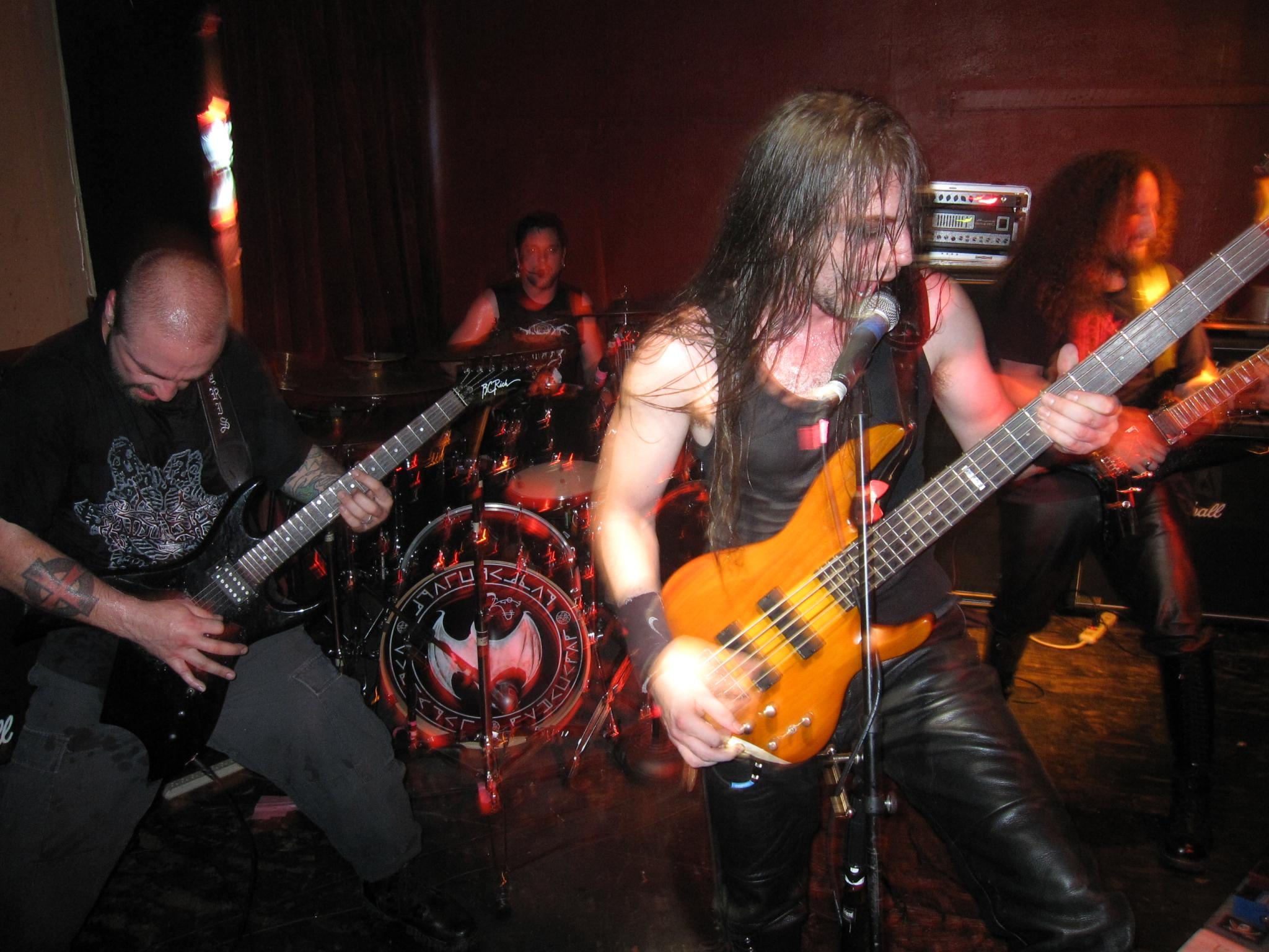 Absu